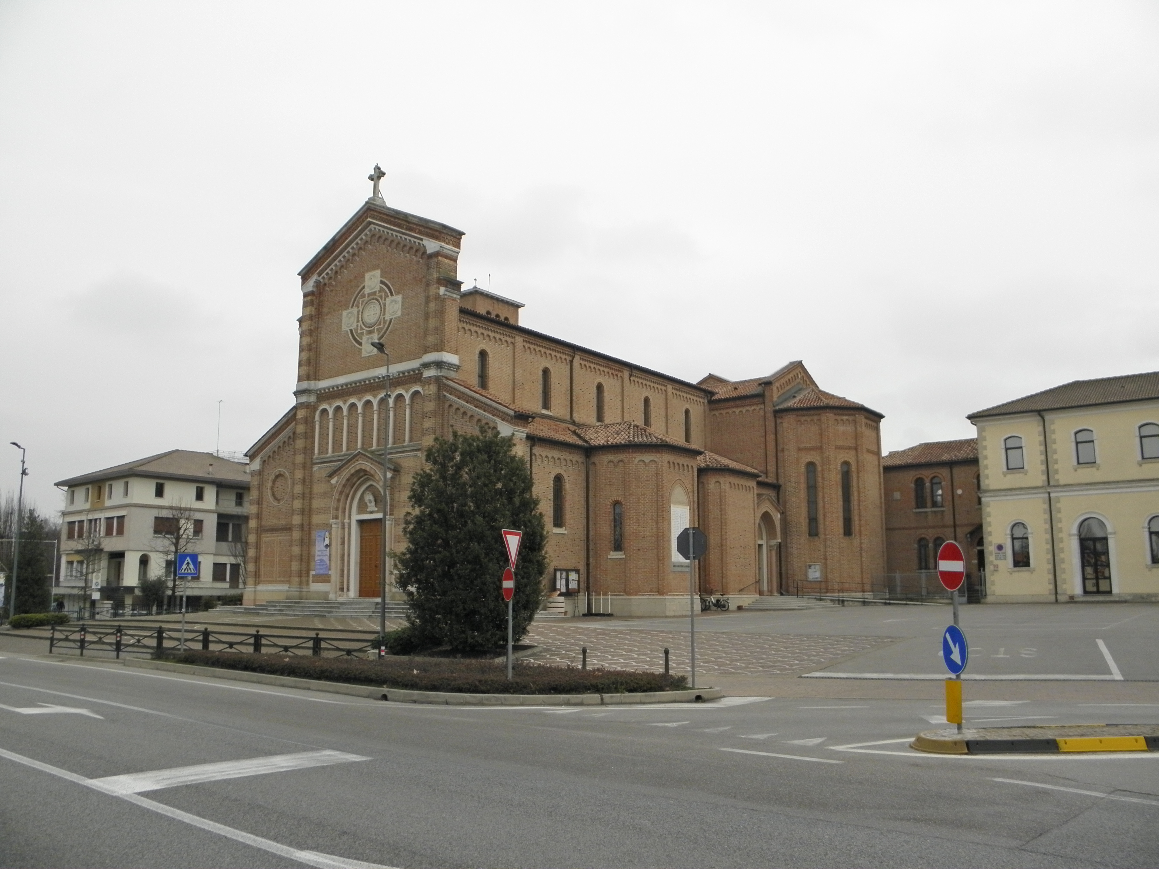 Quinto di Treviso: la chiesa parrocchiale di San Giorgio.